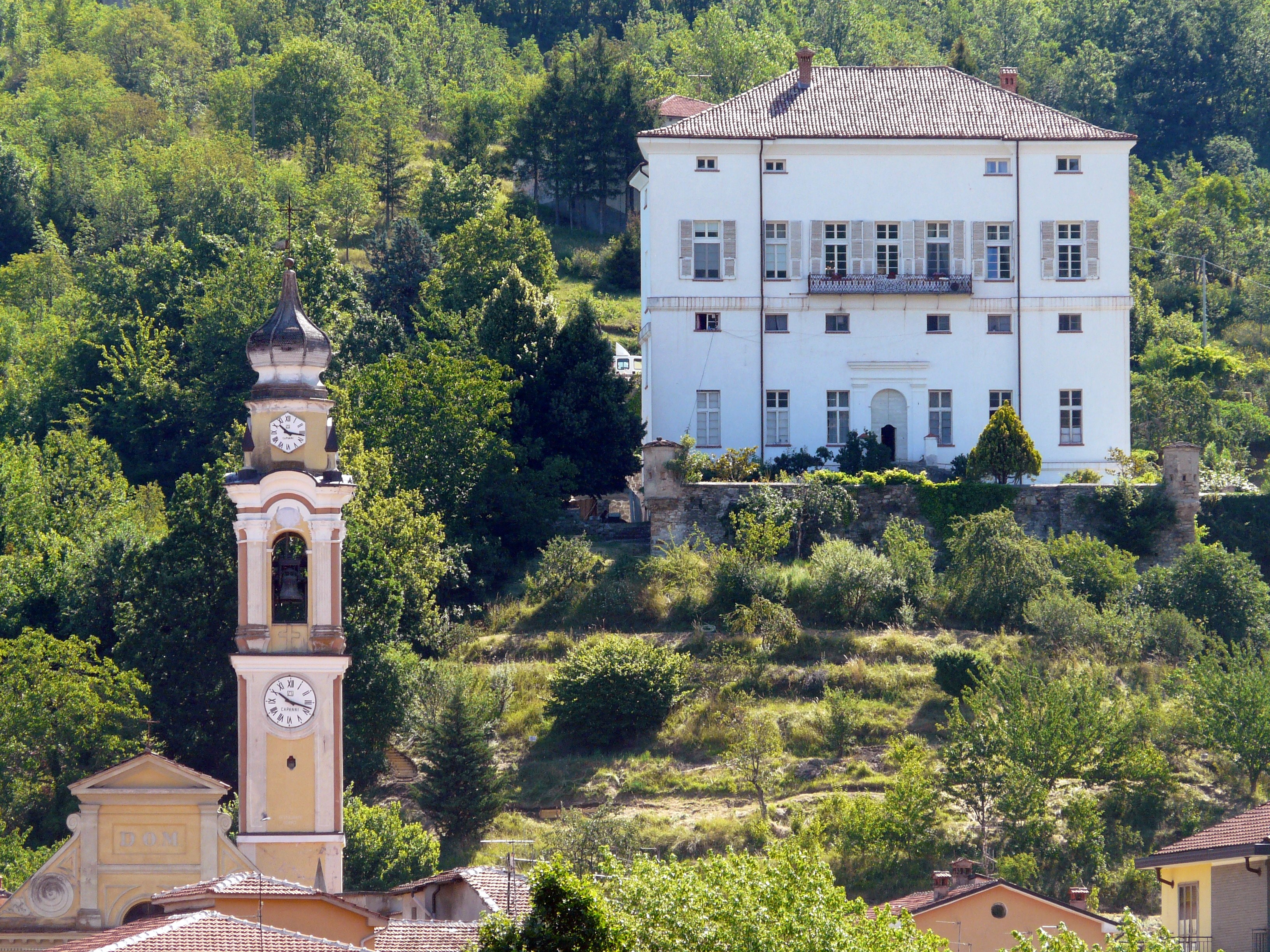 Palazzo Doria, Cabella Ligure, Piemonte, Italia